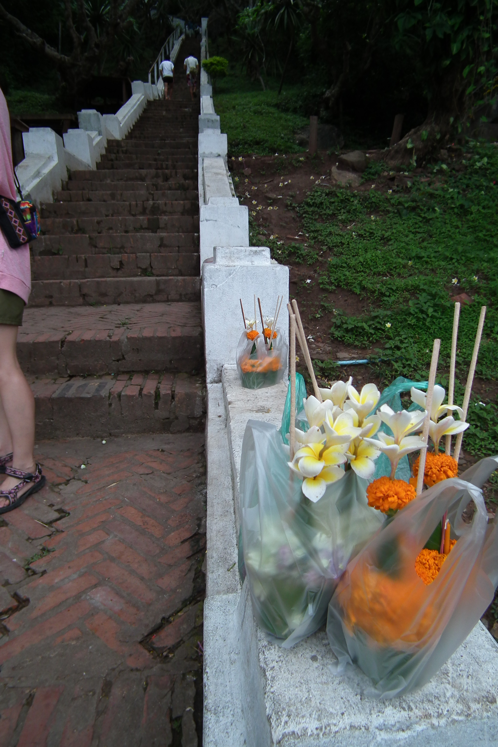 Phou si Luang Prabang Laos プーシーの丘 ラオス・ルアンプラバーン